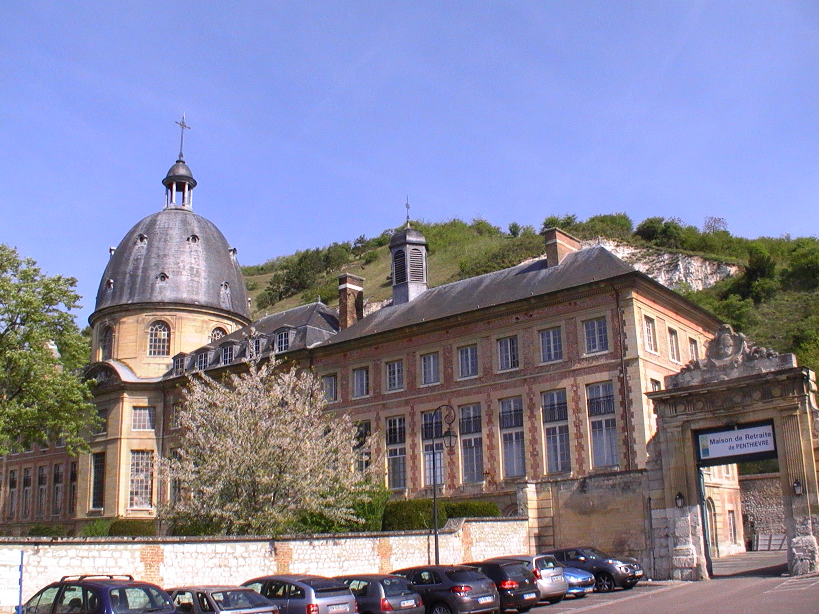 Ancien hospice Saint-Jacques des Andelys (27).